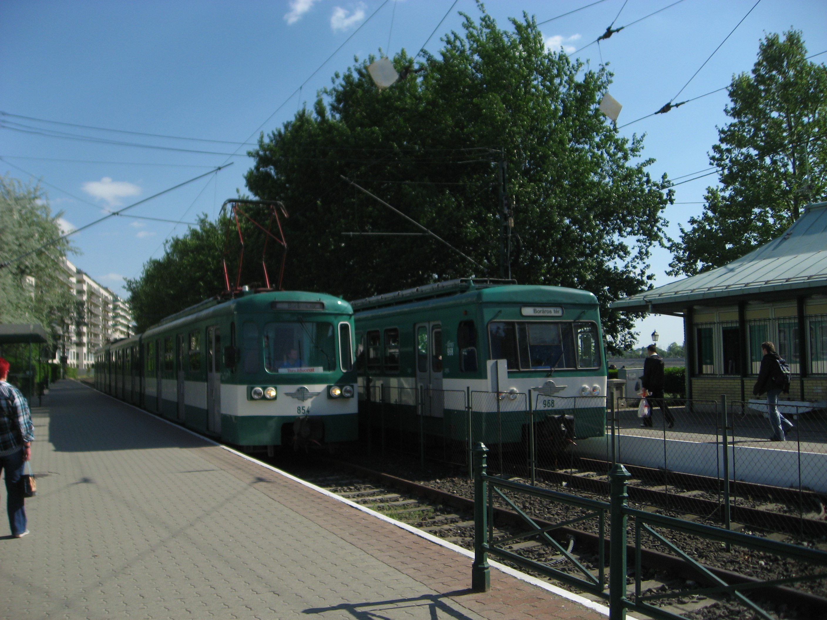 Budapešť